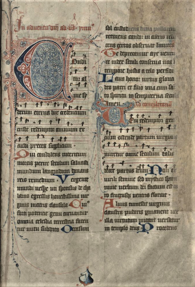 Hymnus Conditor alme siderum, in: Psalterium cum antiphonis et hymnis necnon officio Sancti Blasii, Stadtbibliothek Lübeck, Ms. theol. lat. 2° 6, p. 119 r, ex Dombibliothek